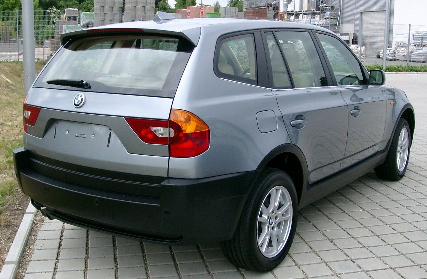 BMW X3